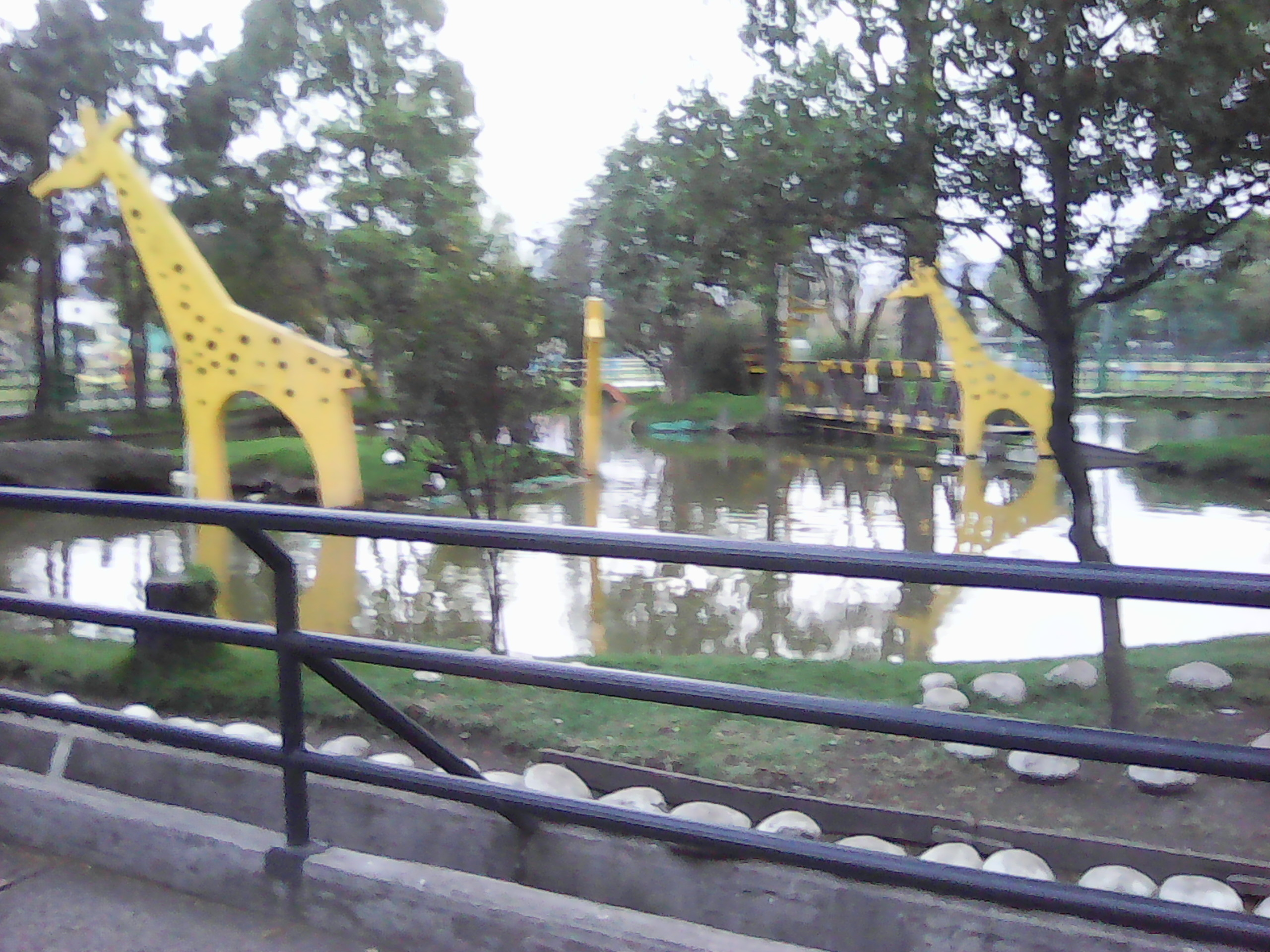 Laguito con jirafas en el parque Ciudad Montes